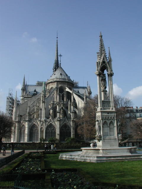 Square Jean XXIII., Paris, France